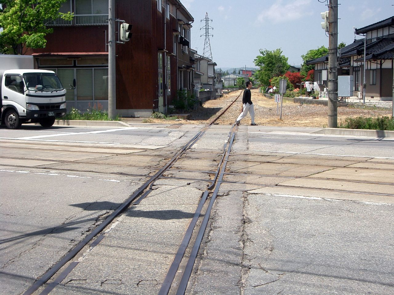 原著作者のコメント：「線路と線路が交差。万葉線(市内電車)と貨物線。高岡市内。」